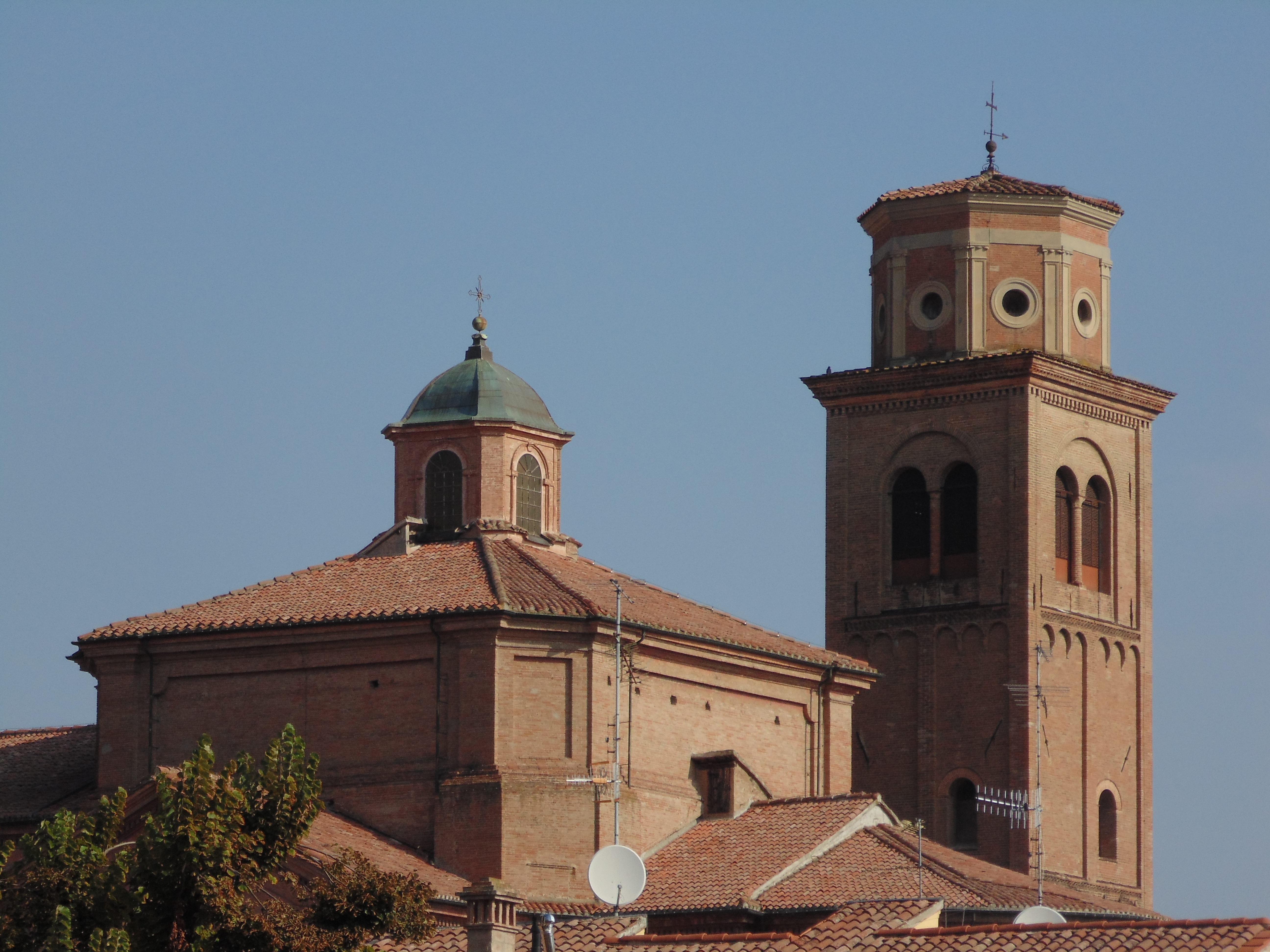 Chiesa cattedrale di San Cassiano - MIBAC This is a photo of a monument which is part of cultural heritage of Italy.